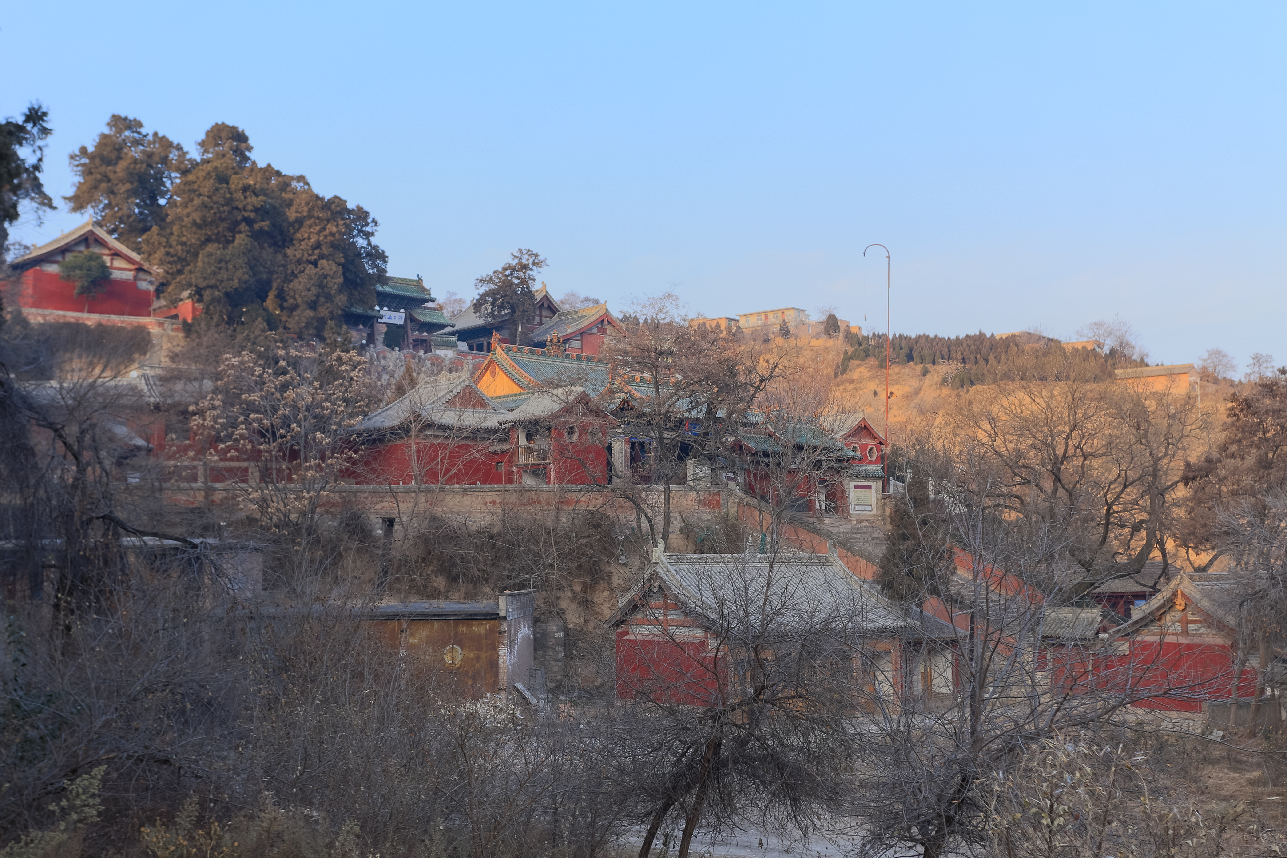 天水玉泉观